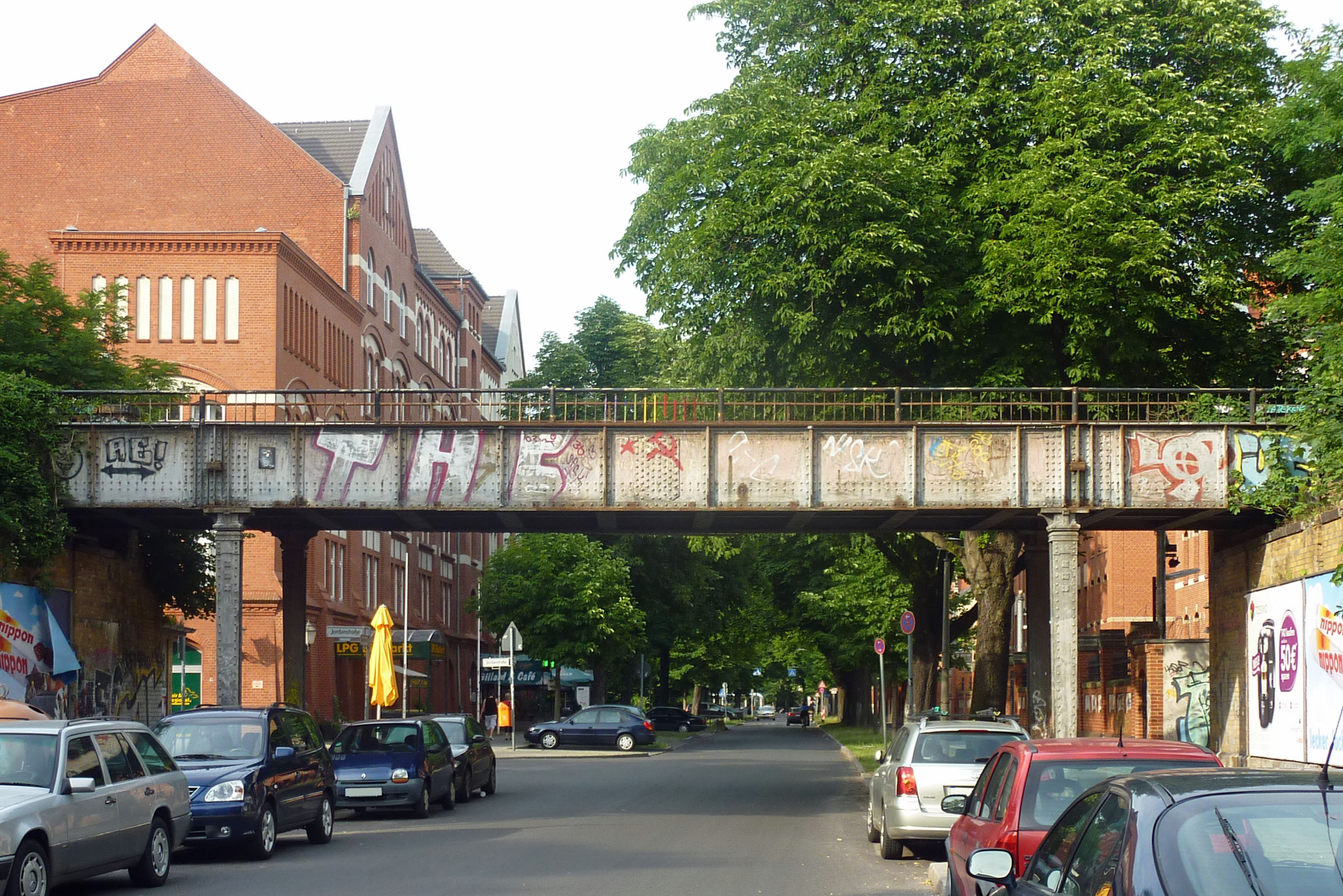 Bouchéstraße in Berlin-Alt-Treptow. Blick zur Ecke Jordanstraße.